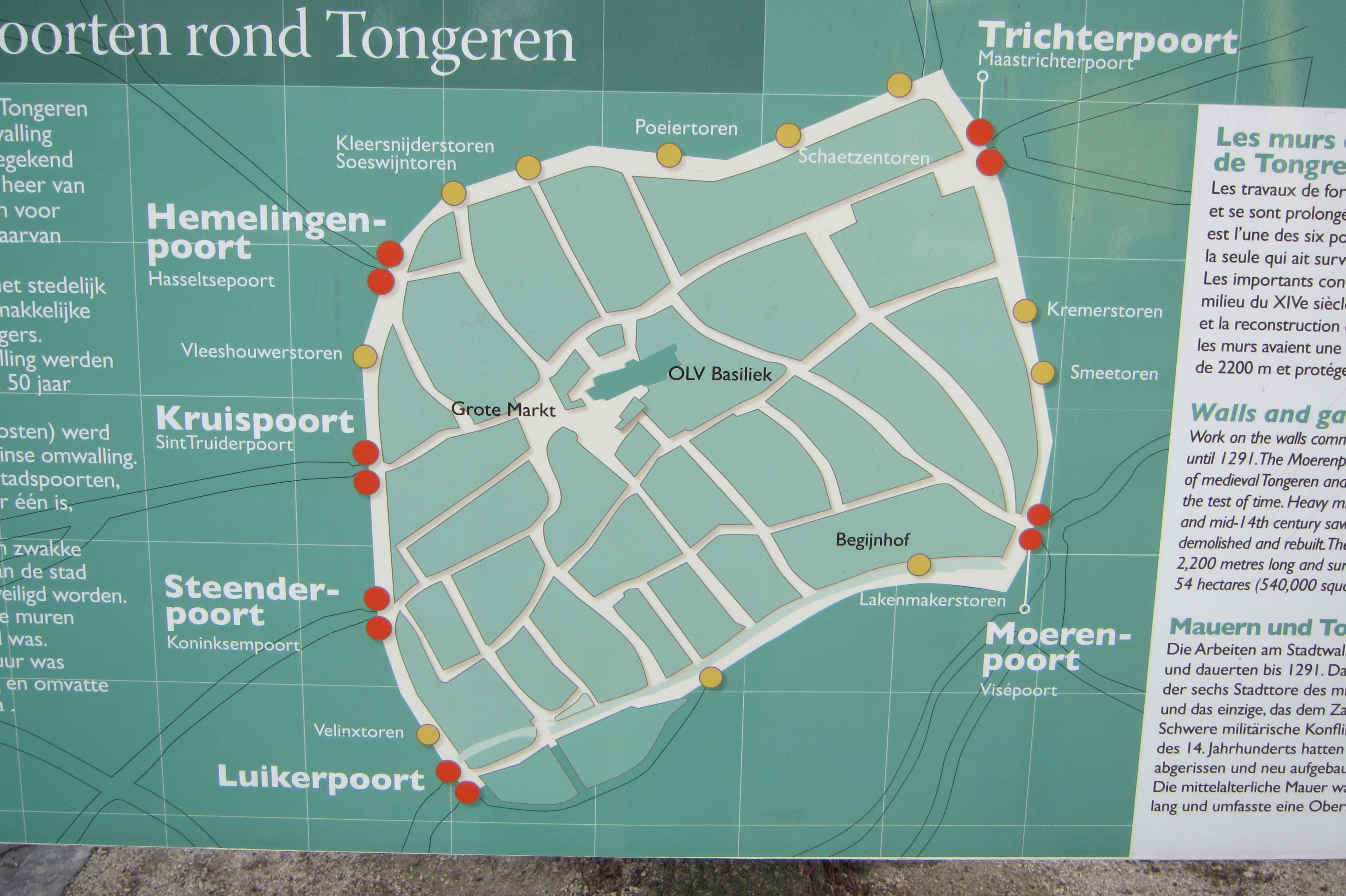 Schema middeleeuwse stadspoorten van Tongeren, Limburg